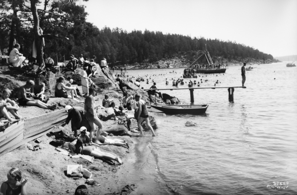 Bygdø sjøbad 1933